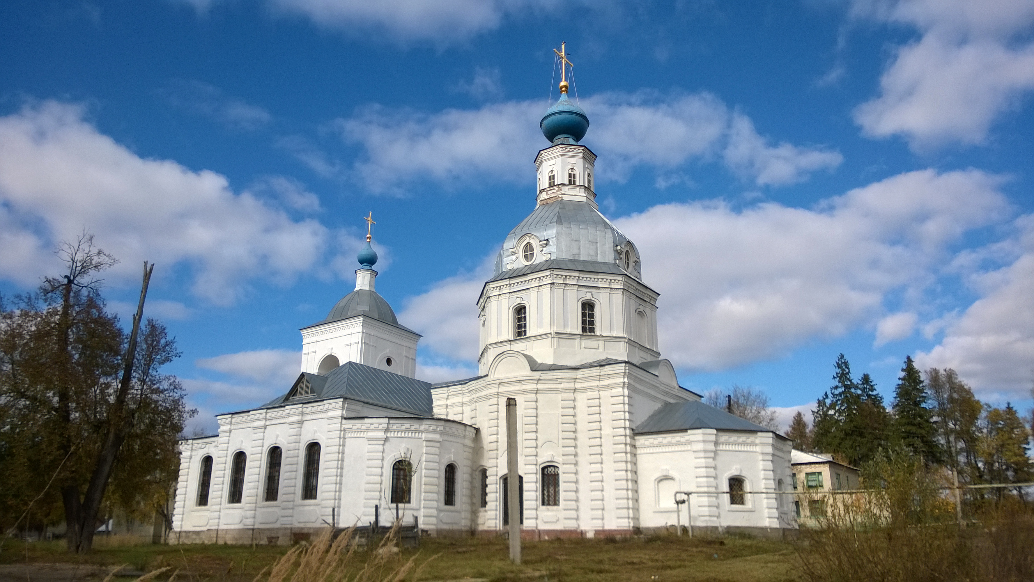 Церковь Иерусалимской иконы Божией Матери: Воспушка, Петушинский район, Владимирская область